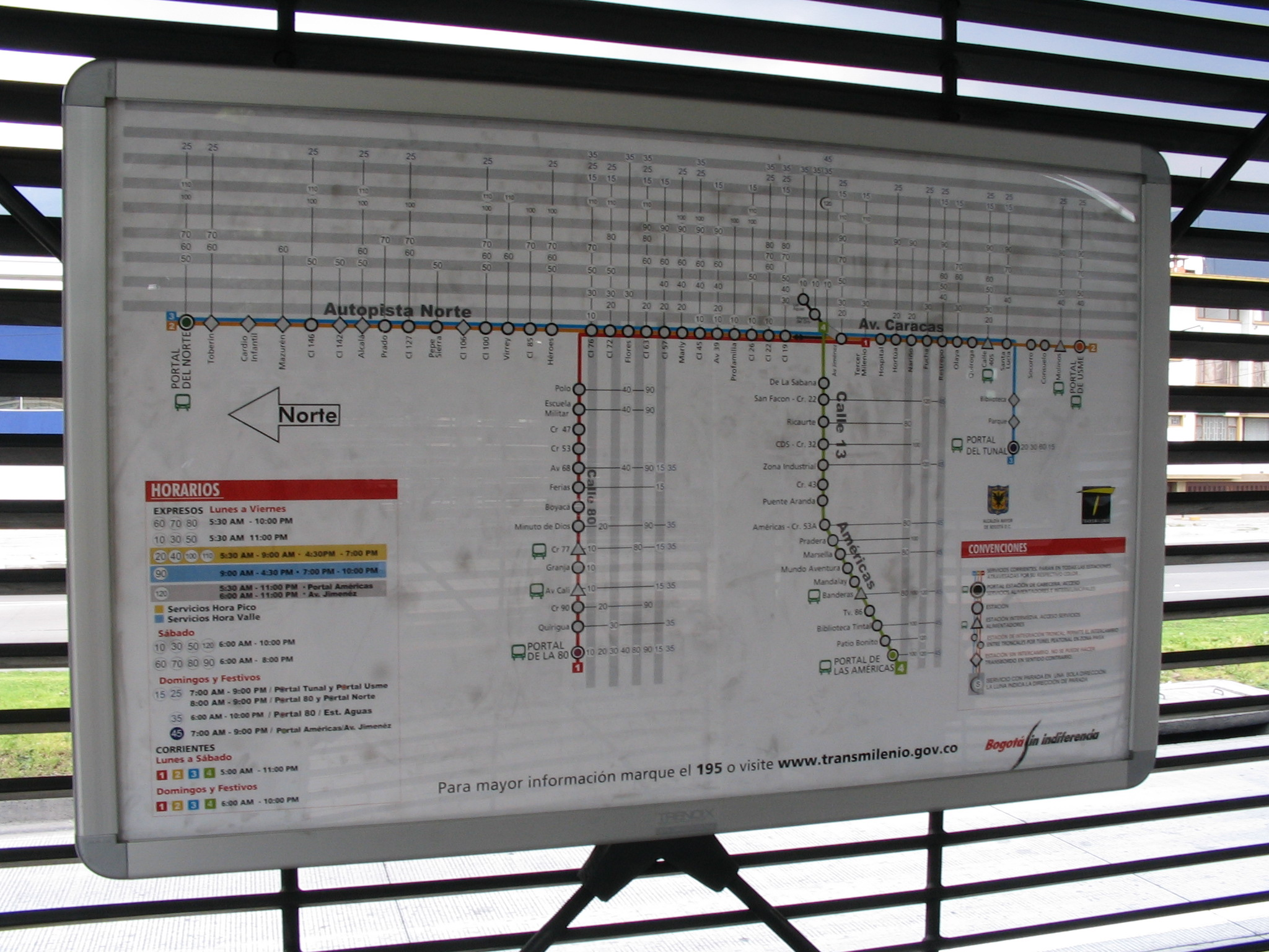 Mapa de las rutas de transmilenio. Señalización de la estación Los Héroes. Fotografía tomada por Tequendamia para la wikipedia. Categoría:Colombia (imagen)